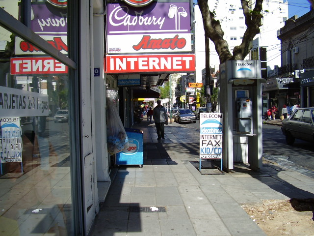 Acera de la avenida Ugarte al 1500, Olivos